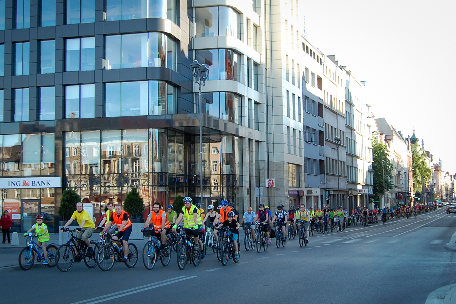 93. Gliwicka Masa Krytyczna na ul. Zwycięstwa w Gliwicach